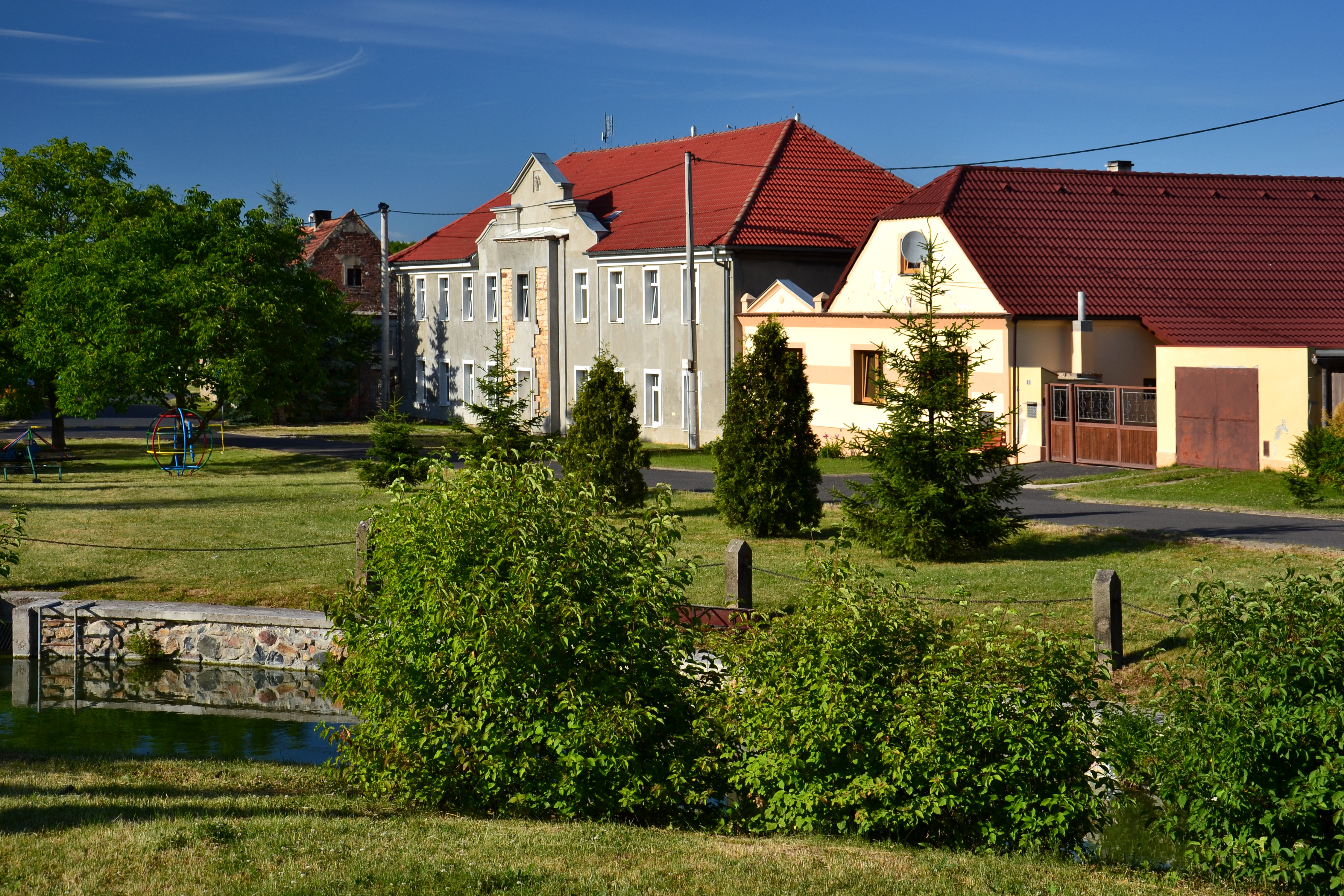 Náves v Hošnicích